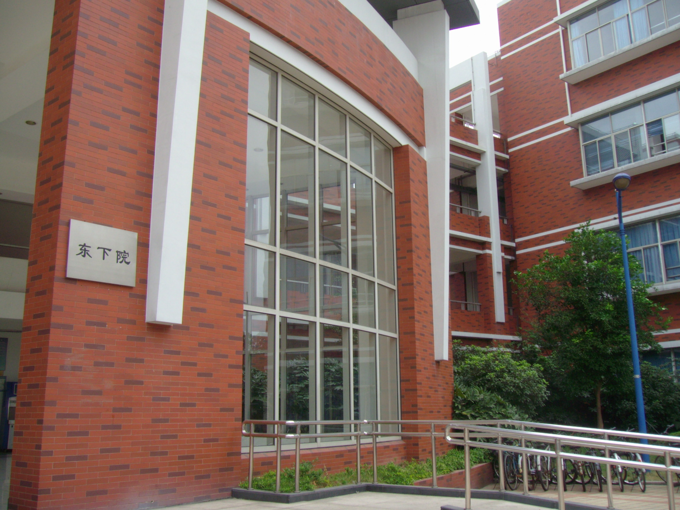 上海交大闵行校区